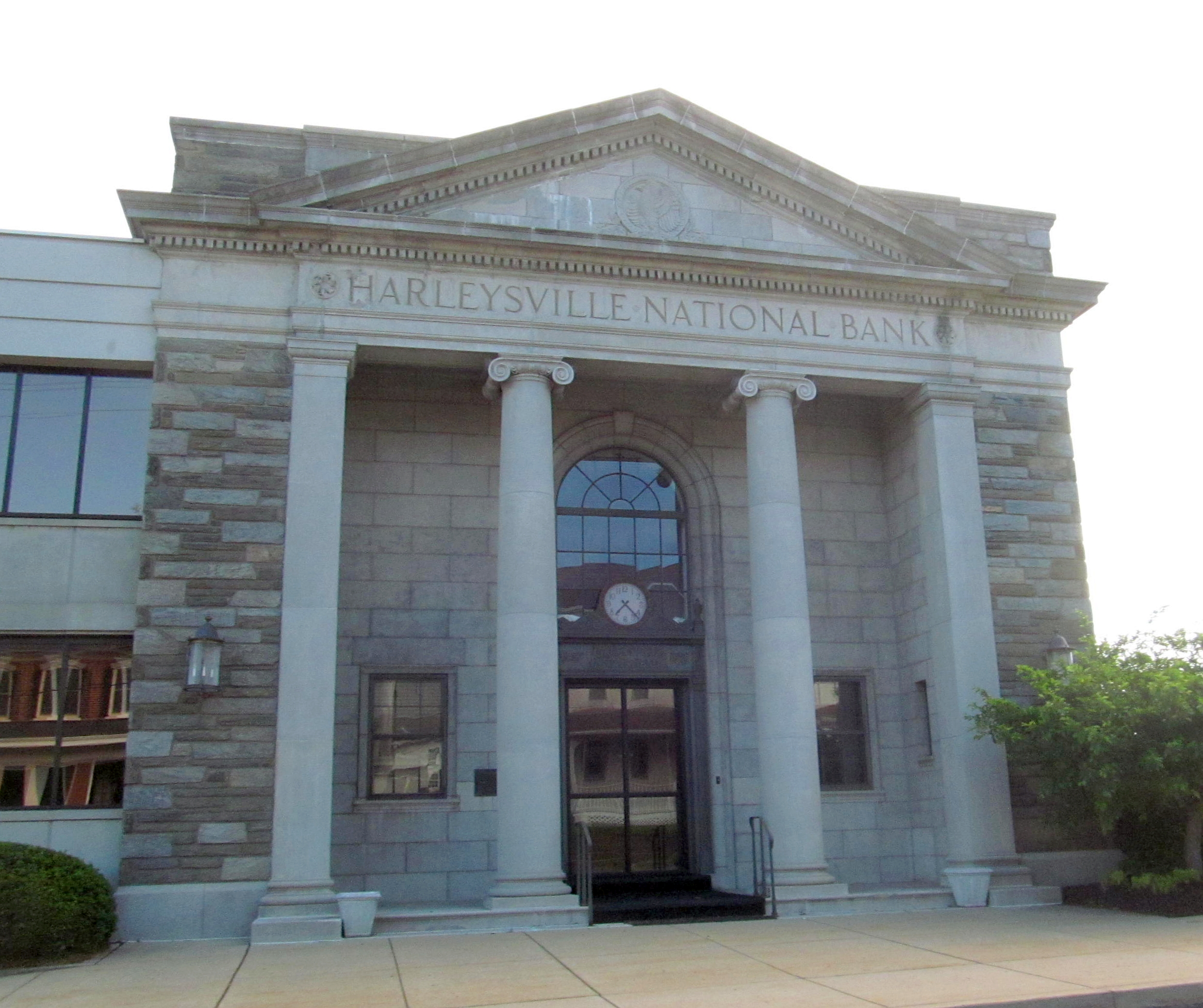 Harleysville National Bank, Harleysville, Pennsylvania.